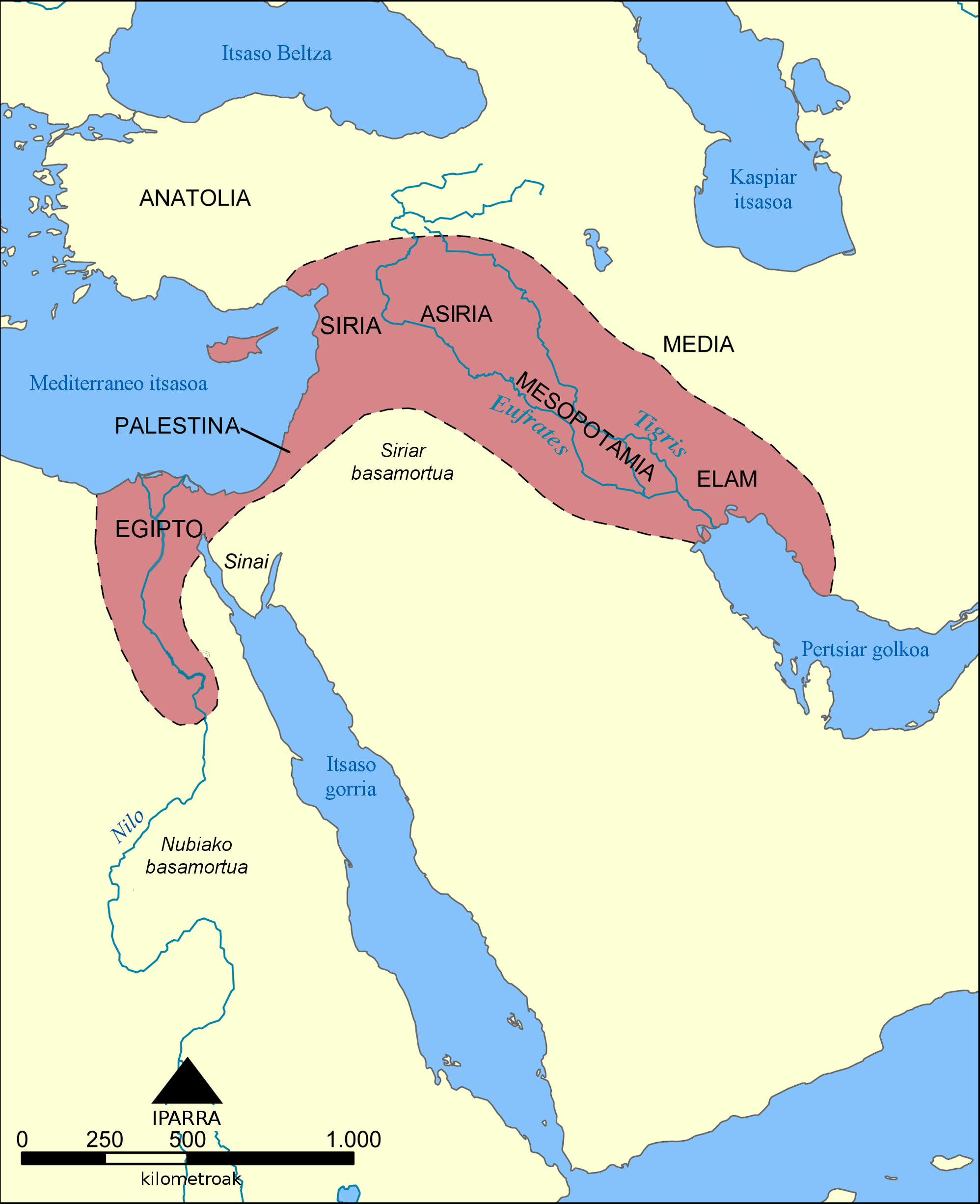 Ilgora Emankorra deritzon eskualdearen kokalekua eta hedadura erakusten du mapa honek.